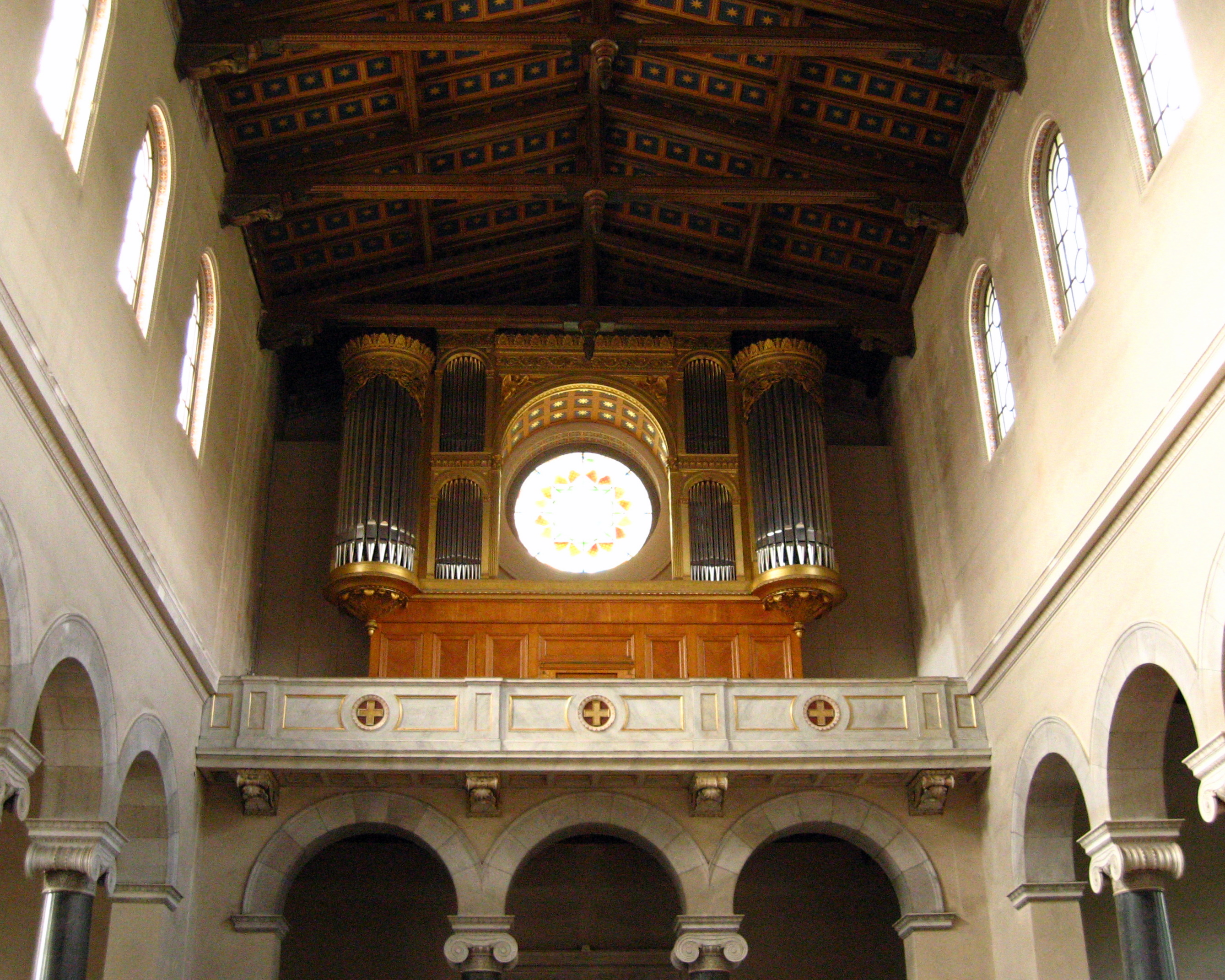 Potsdam - Friedenskirche - Orgel (Woehl 2004)